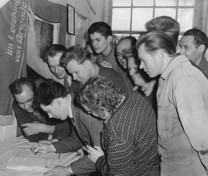 Zentralbild-Schmidt-9.11.1960 "Brigade Komsomol" schreibt an den Staatsrat.Die Brigade der Sozialistischen Arbeit "Brigade Komsomol" vom Schalterbau des VEB Meßgerätewerk Quedlinburg war als zweite Brigade des Bezirks Halle dem Aufruf der Brigade vom Elektrochemischen Kombinat Bitterfeld gefolgt und am 1.Mai 1960 als Brigade der Sozialistischen Arbeit ausgezeichnet worden.Am 8.November 1960 schrieben sie an den Vorsitzenden des Staatsrates Walter Ulbricht und drückten darin ihre Zustimmung zur Programmatischen Erklärung des Staatsrates aus.Sie verpflichten sich, das Gütezeichen "Q" für ihre Erzeugnisse zu erringen und die persönliche Verantwortung für sie unter der Losung "Meine Hand für mein Produkt" zu übernehmen,sowie dem 1.Lehrjar des Lernaktivs "Komsomol" im Rahmen des Berufswettbewerbes jegliche Hilfe zu geben.Sie wollen ihren Produktionsplan in all seinen Positionen erfüllen,damit sie im Wettbewerb zwischen den Meßgerätewerken Quedlinburg und Magdeburg erfolgreich abschneiden.Ubz: Mitglieder der Brigade "Komsomol" unterzeichnen den Brief an den Vorsitzenden des Staatsrats Walter Ulbricht."